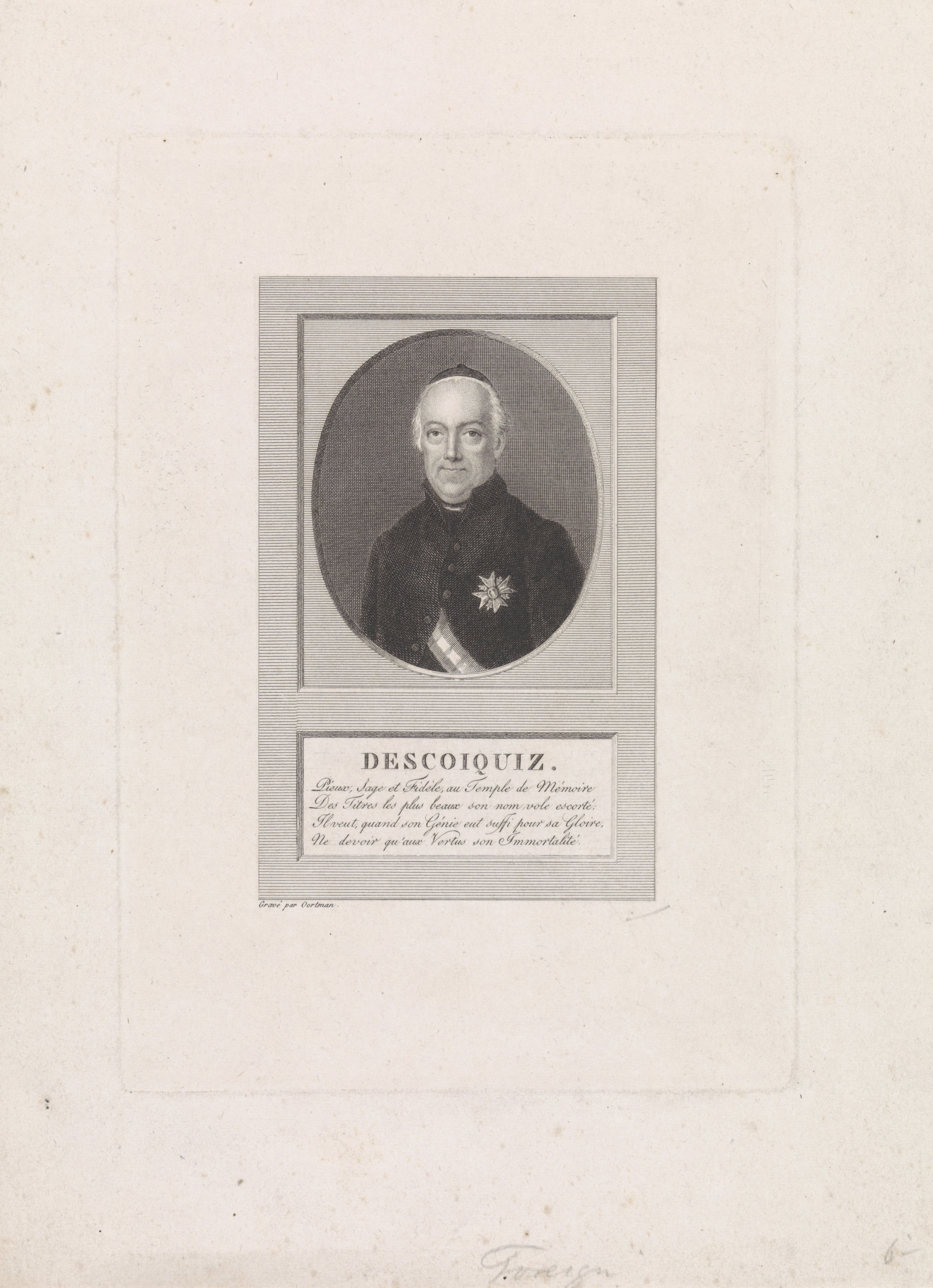 IdentificatieTitel(s): Portret van Juan d'EscoïquizObjecttype: prent Objectnummer: RP-P-1908-1183Opschriften / Merken: verzamelaarsmerk, verso, gestempeld: Lugt 2228VervaardigingVervaardiger: prentmaker: Joachim Jan Oortman jr. (vermeld op object)Plaats vervaardiging: Parijs (mogelijk)Datering: ca. 1802 - 1818Fysieke kenmerken: etsMateriaal: papier Techniek: etsenAfmetingen: plaatrand: h 185 mm × b 132 mmOnderwerpWie: Juan d'EscoïquizVerwerving en rechtenVerwerving: aankoop 1905Copyright: Publiek domein